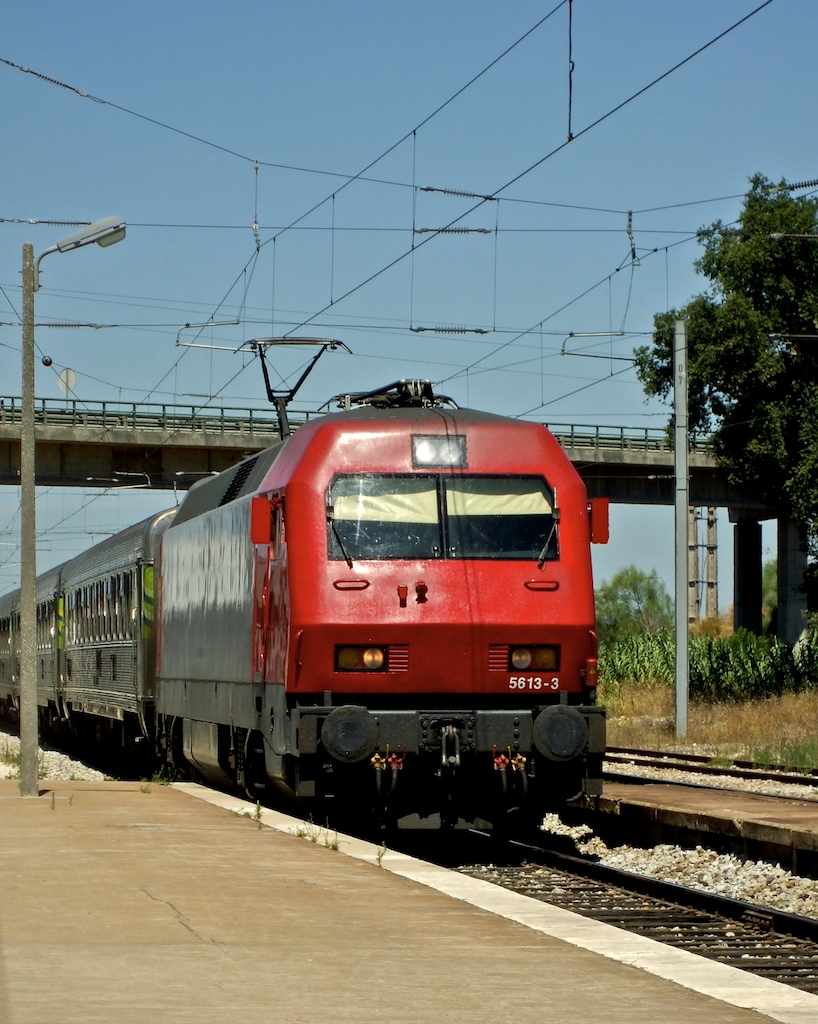 Tipo: Comboio Intercidades 570 [Lisboa • Oriente - Faro] Local: Estação de Alcácer do Sal [Linha do Sul, PK 78] Data e hora: 2 de Agosto de 2008 [12h01] Material: Locomotiva 5613 + 8 carruagens (7 Sorefame Renovadas e 1 Corail)